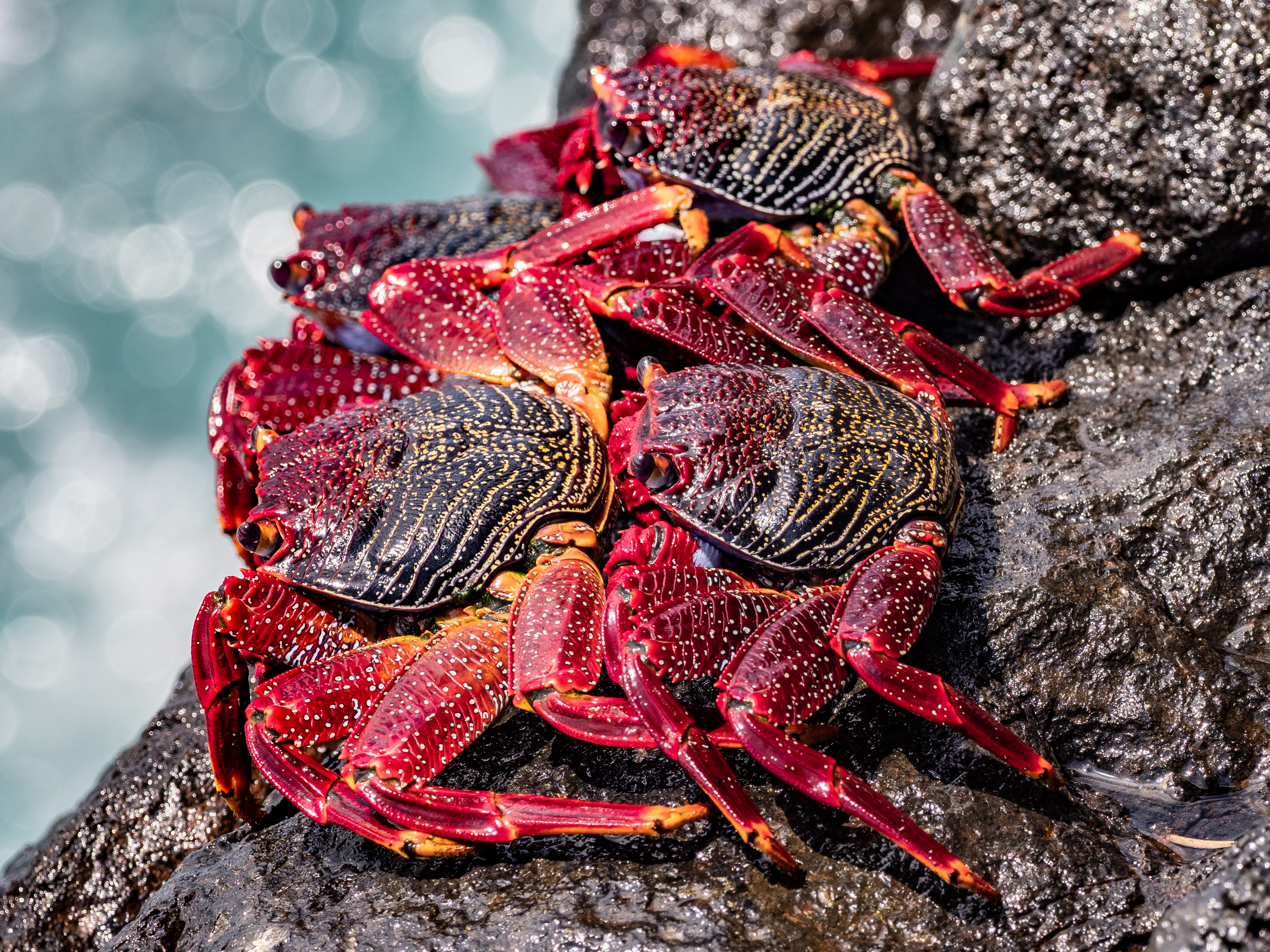 La Isleta, Las Palmas, Gran Canaria, April 2019